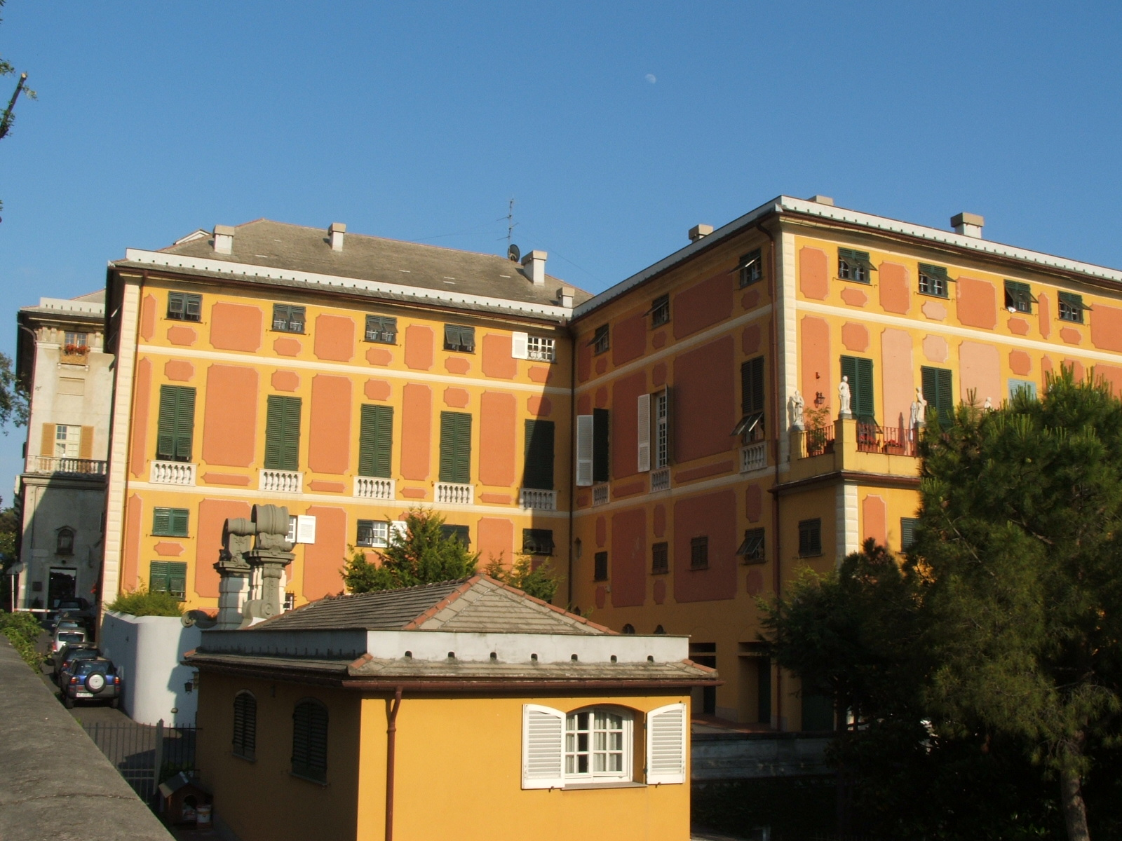 Genova, quartiere di Albaro